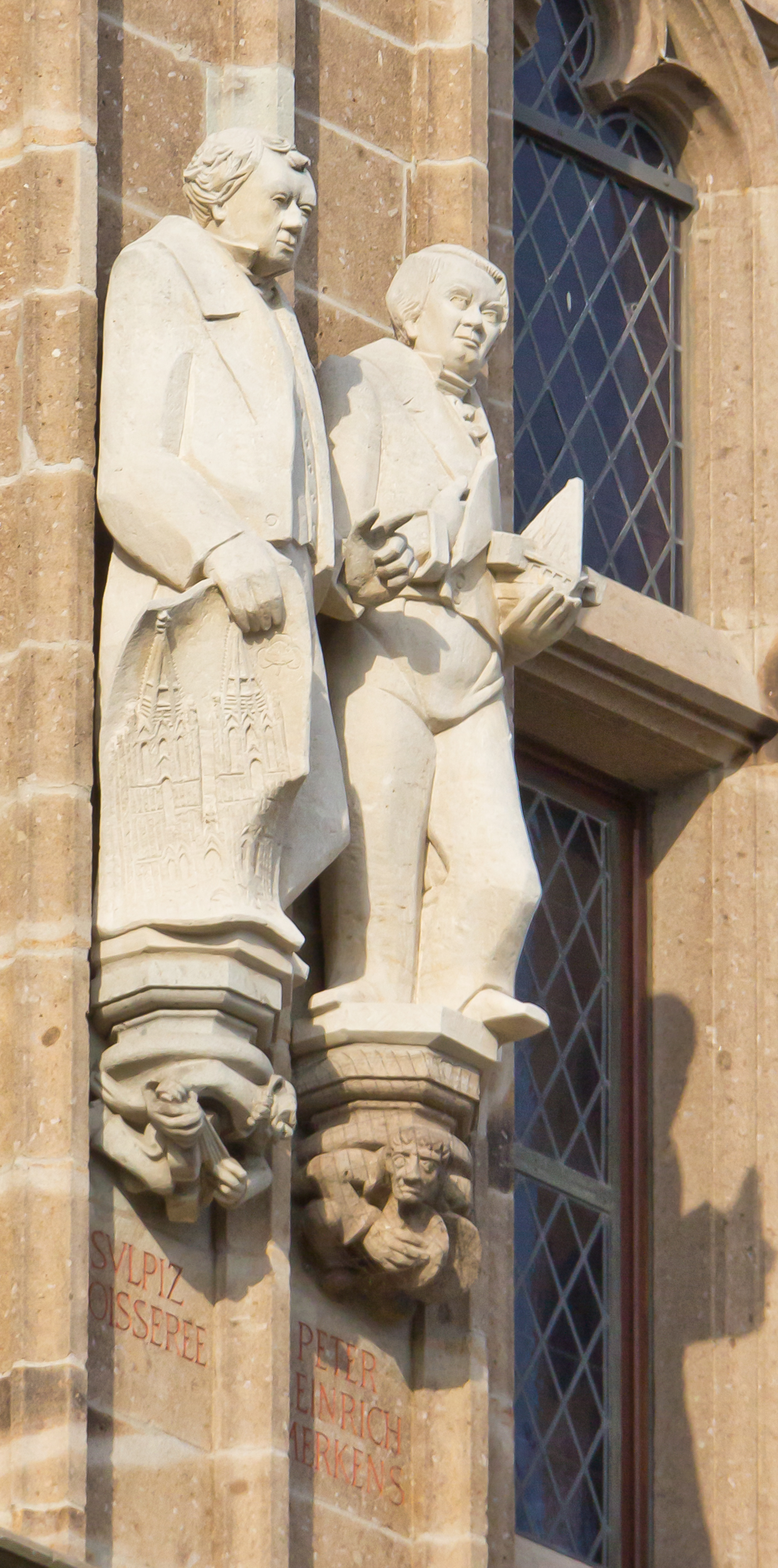 Rathausturm Köln mit den Figuren des Sulpiz Boisserée und Peter Heinrich Merkens Details zu der Statue: Bildhauer der Boisserée-Statue: Stefan Kaiser Bildhauer der Merkens-Statue: Stefan Kaiser Details zu der Konsole: Thema der Konsole unter der Boisserée-Statue: „Der Generalbaß“. Bildhauer: Herbert Rausch Thema der Konsole unter der Merkens-Statue: „Beckenschläger“. Bildhauer: Herbert Rausch